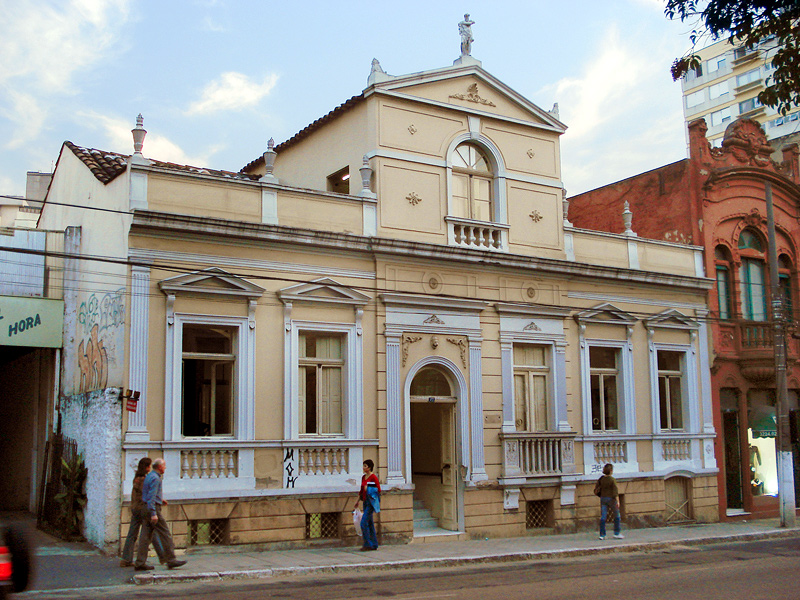 Casa Torelly, Porto Alegre, Brasil.